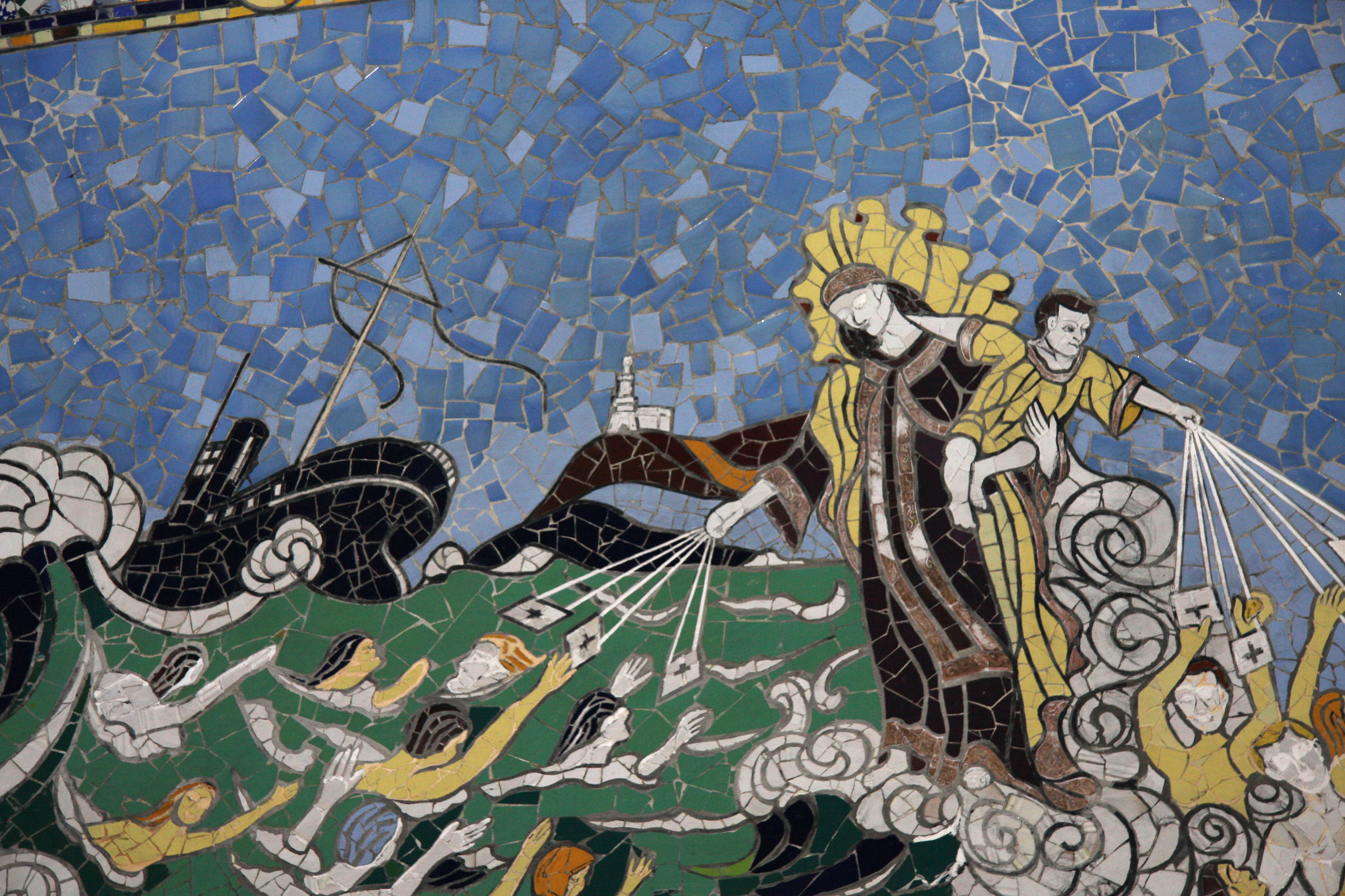 Una de las grandes obras de Antonio Palacios en Galicia es el Templo Votivo Mar en Panxón, proyectado entre 1932 y 1937. Actualmente este hermoso edificio se encuentra muy deteriorado por el modo y los materiales con los que se edificó el templo, que se levantó gracias a las aportaciones de los vecinos, que contribuyeron a su construcción incluso con materiales reciclados. El templo se halla cargado de referencias historicistas. Los pazos barrocos, la catedral de Tui, o las ruinas de un arco visigodo (siglo VII) que se encuentra en su mismo entorno, servirán de elementos inspiradores para Antonio Palacios. Uno de sus mejores tesoros es el tratamiento de la luz a través de las vidrieras industriales montadas en hormigón. Visita muy recomendada en el Val Miñor.